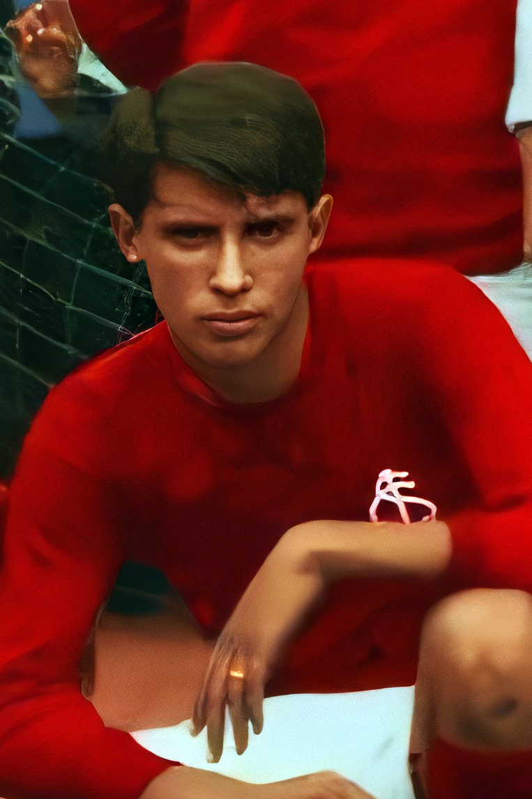 Belarmino Carlos Leal D'Ávila, o Bendionda, ex-jogador do Sport Club Internacional.